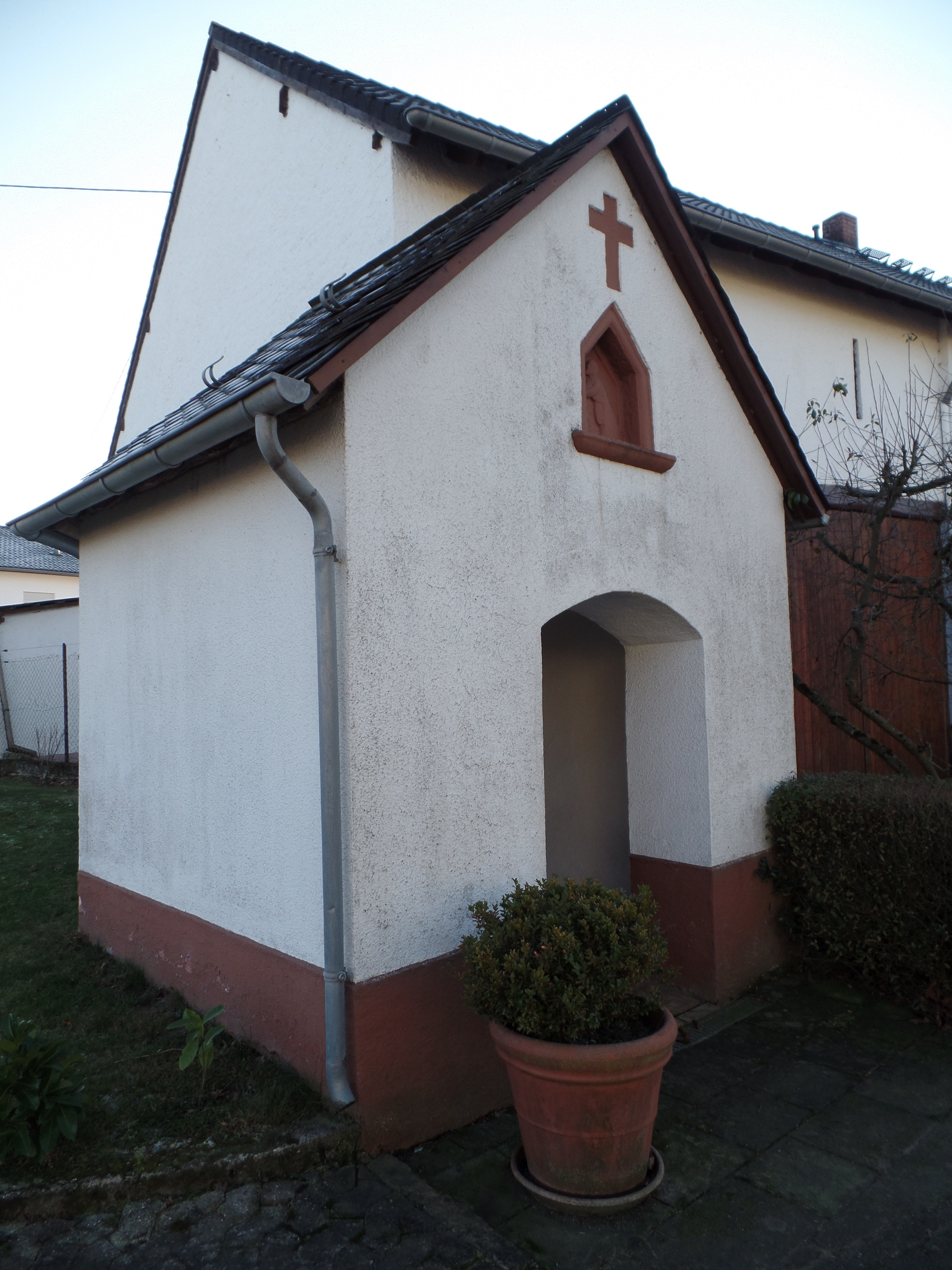 Dank-Kapelle von Johann-Kreuz, Landscheid, Burger Straße 26.